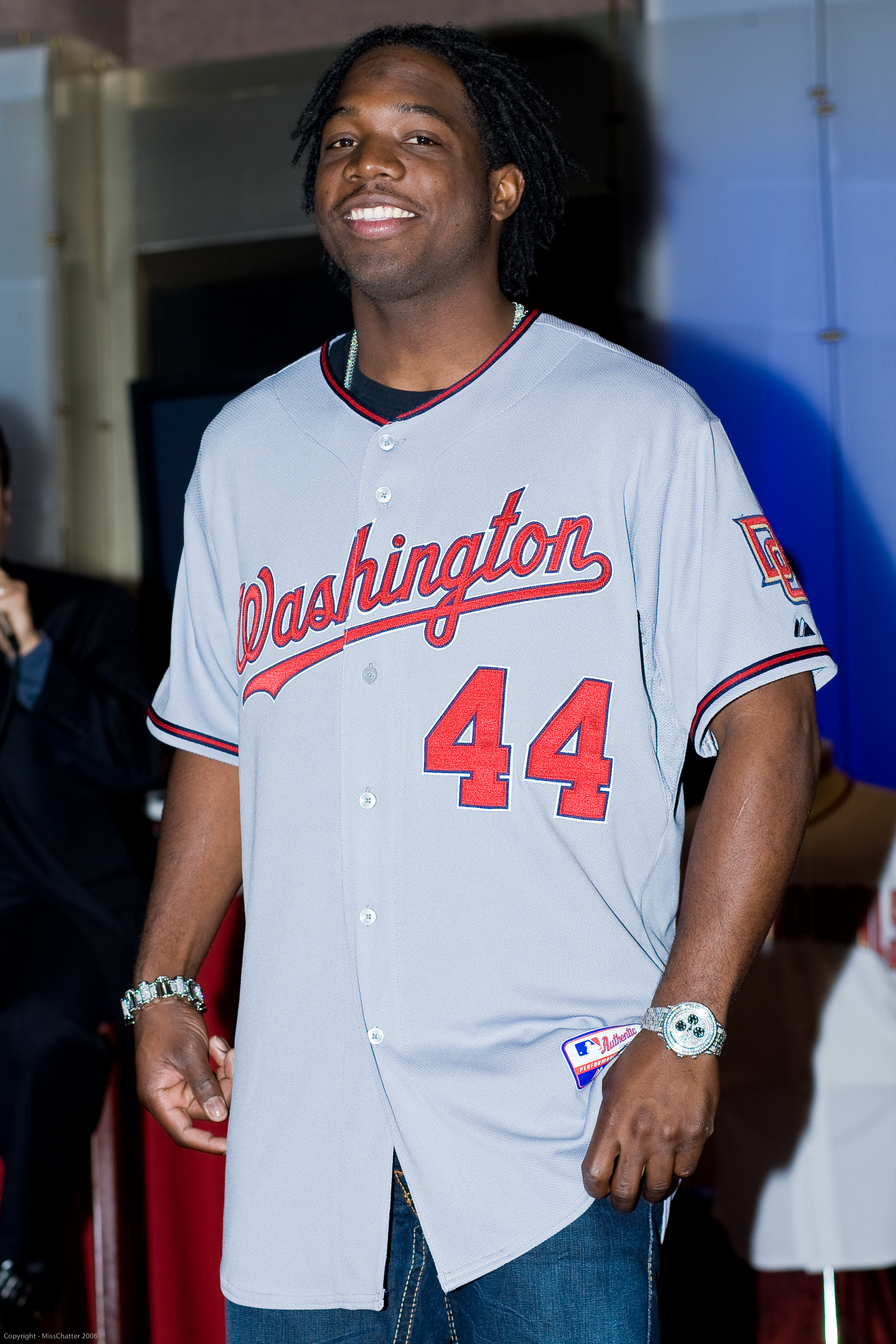 Lastings Milledge